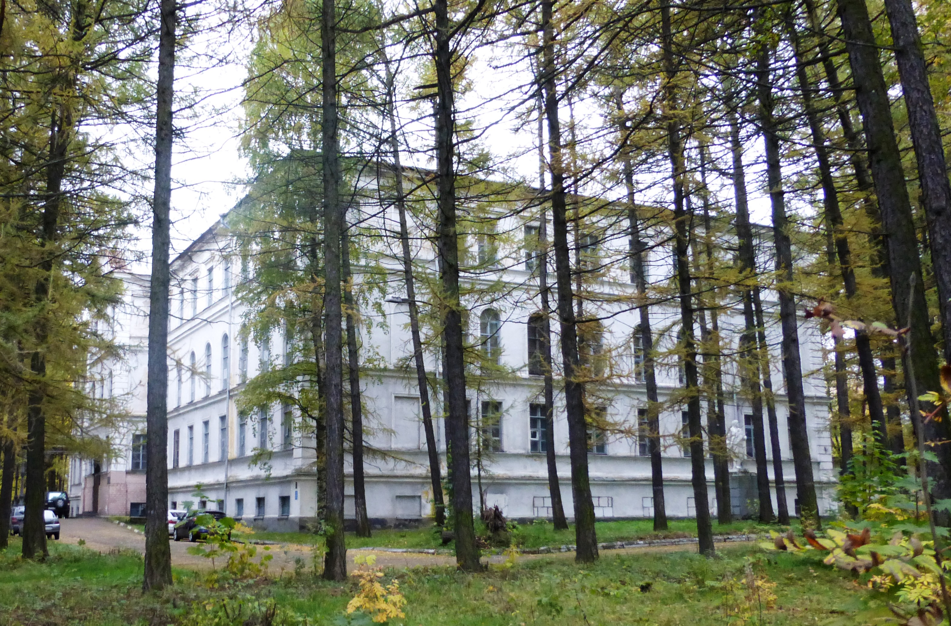 Здание бывшей Олонецкой духовной семинарии в Петрозаводске.